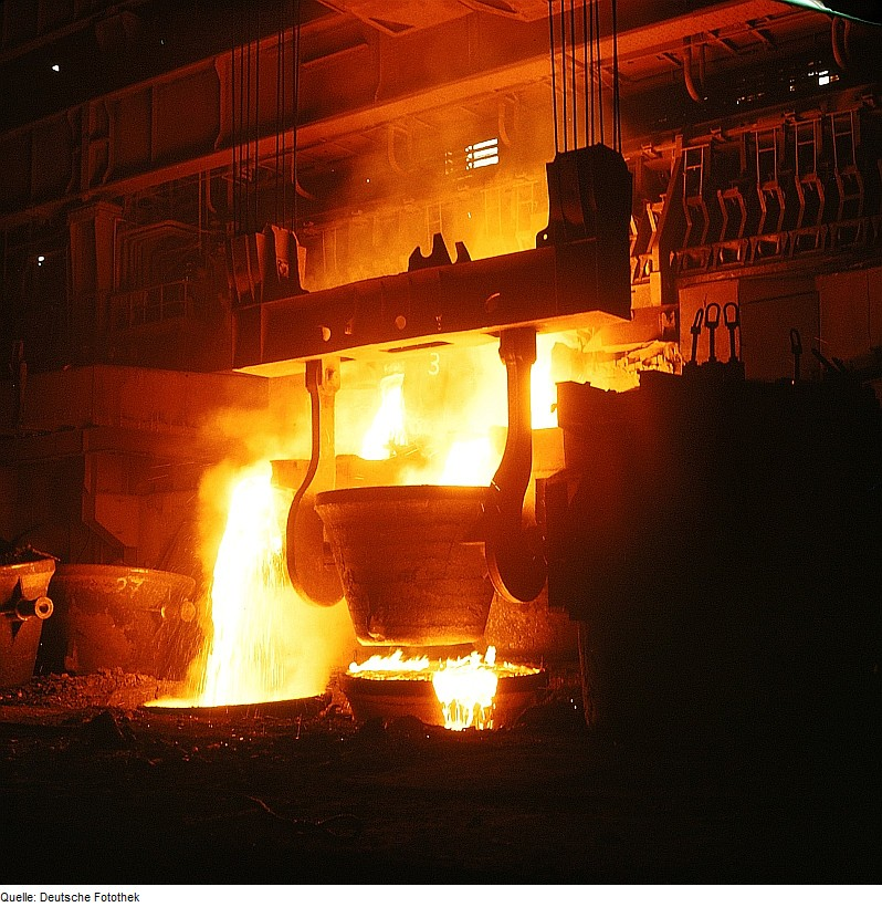 Original image description from the Deutsche FotothekMetallurge für Hüttentechnik